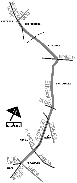 Plano del trazado de la futura Autopista Vespucio Oriente de Santiago de Chile.